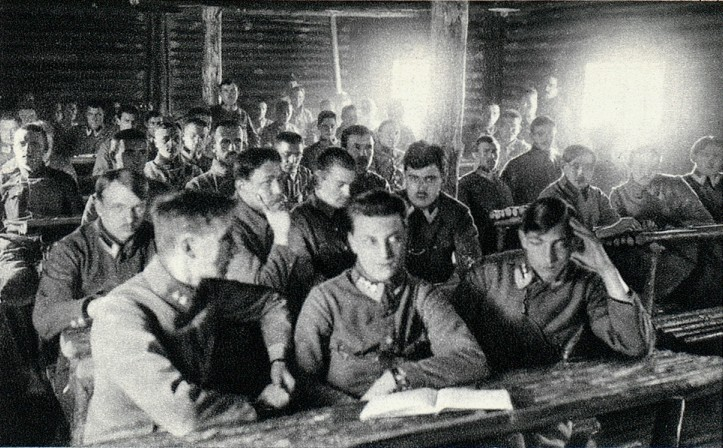 Szkoła podchorążych Legionów Polskich w Legionowie.